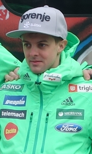 Tomaž Naglič